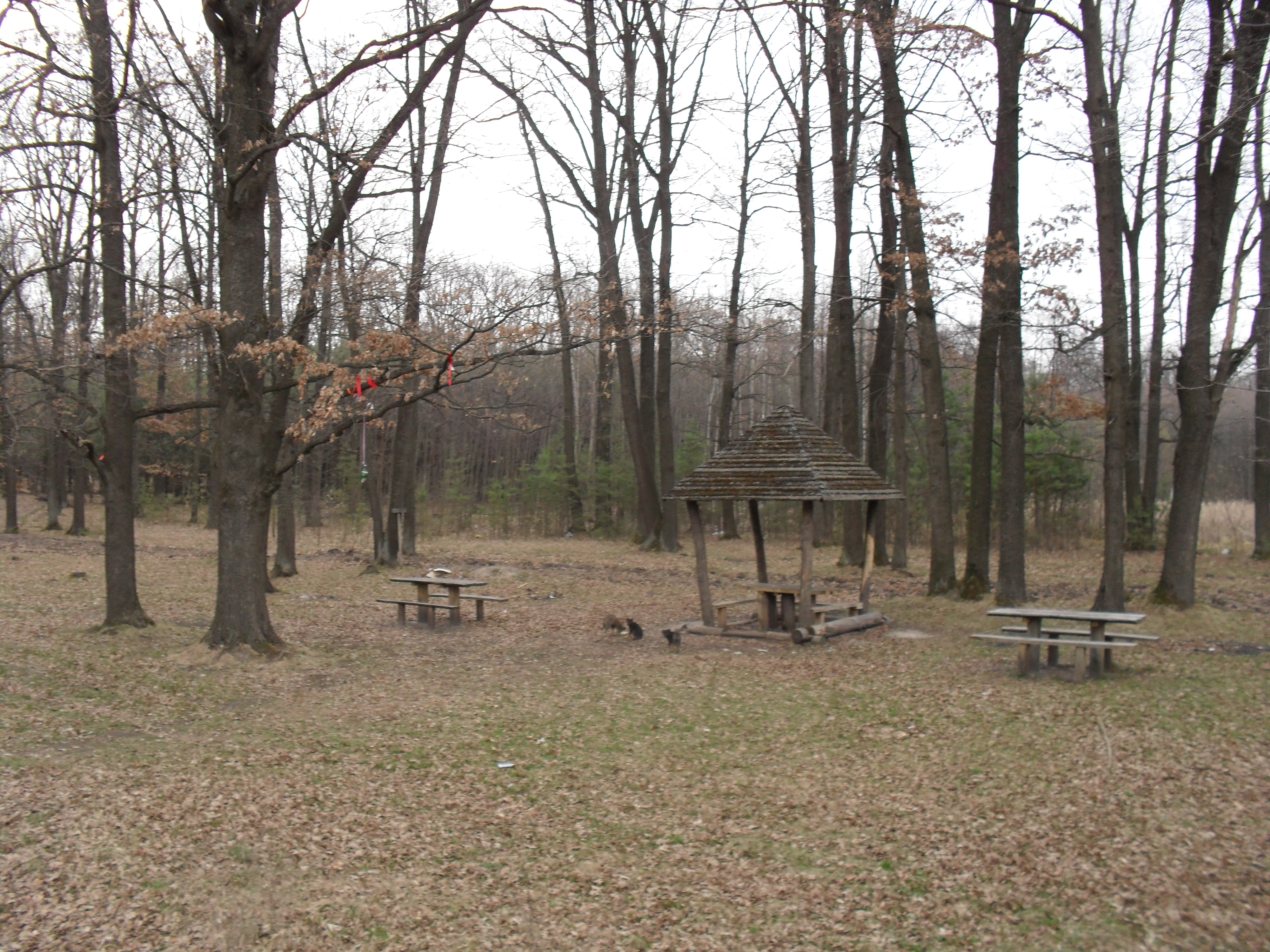 смт. Турбів. Місцевість поблизу "дерева кохання"